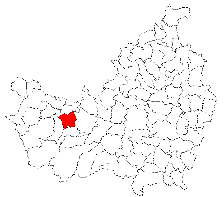 Categorie:Hărţi ale judeţului Cluj